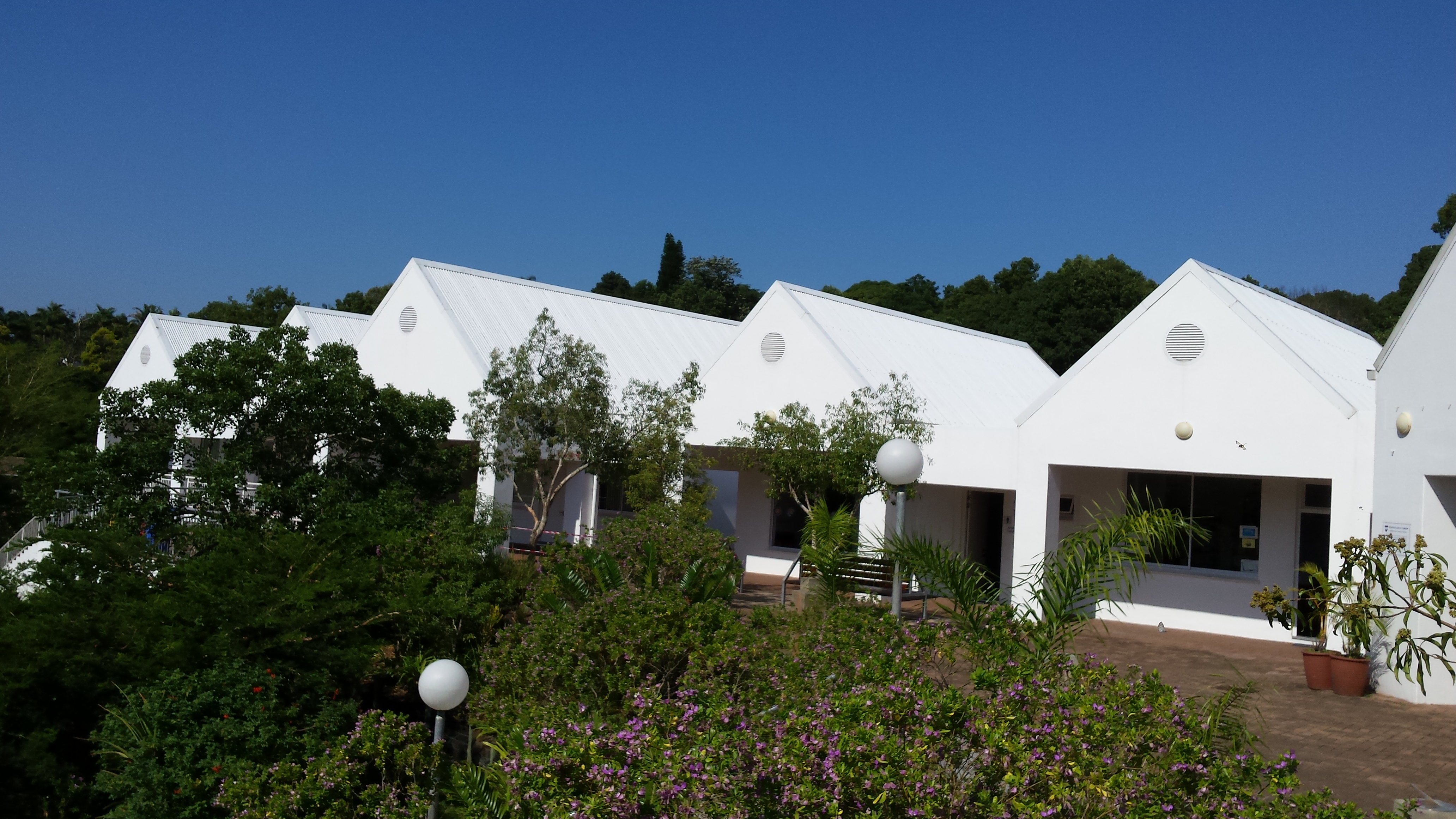 Das Schulgebäude der Deutschen Schule Durban